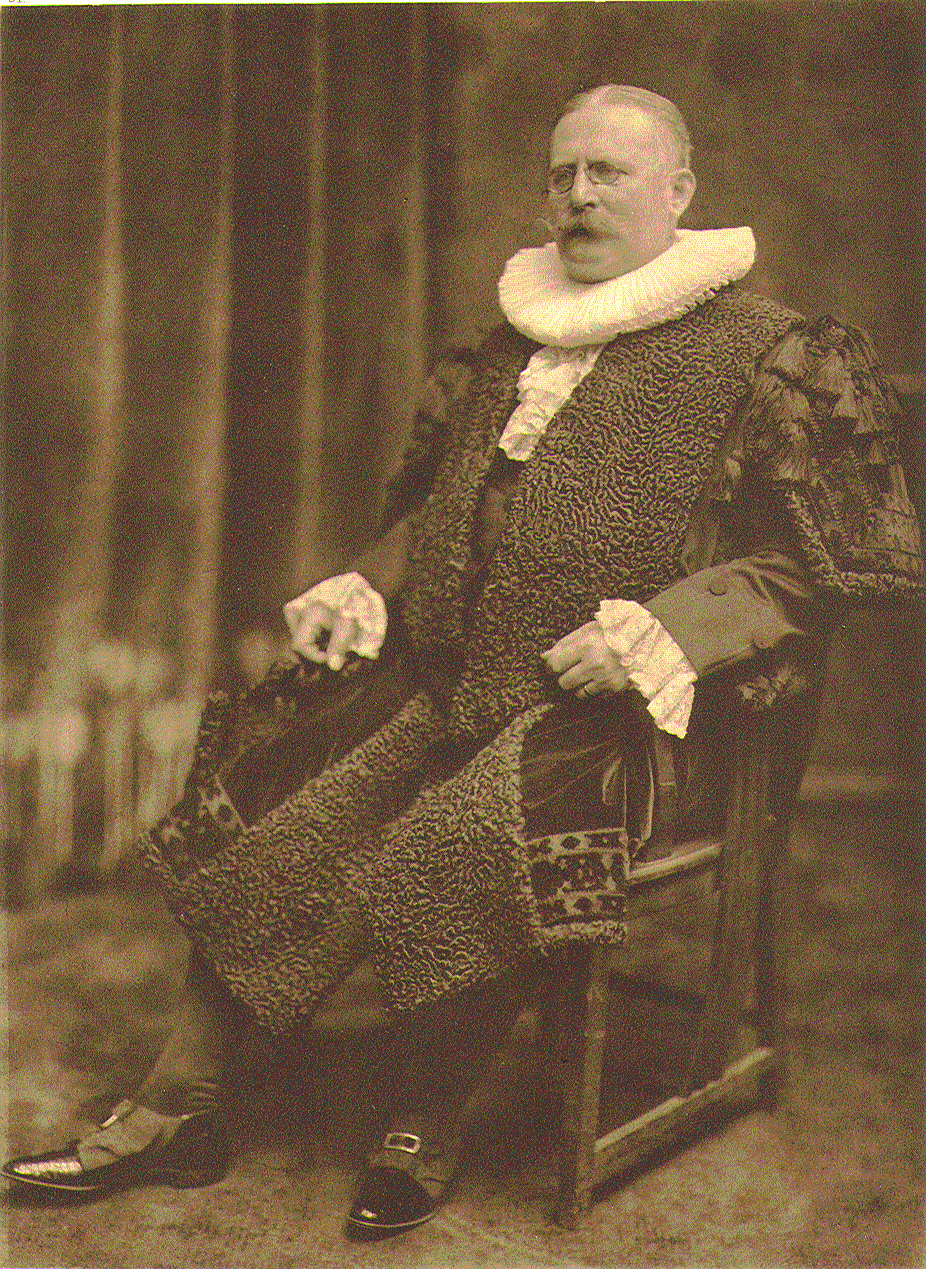 Heinrich Christian Sander, Hamburger Jurist und Senator